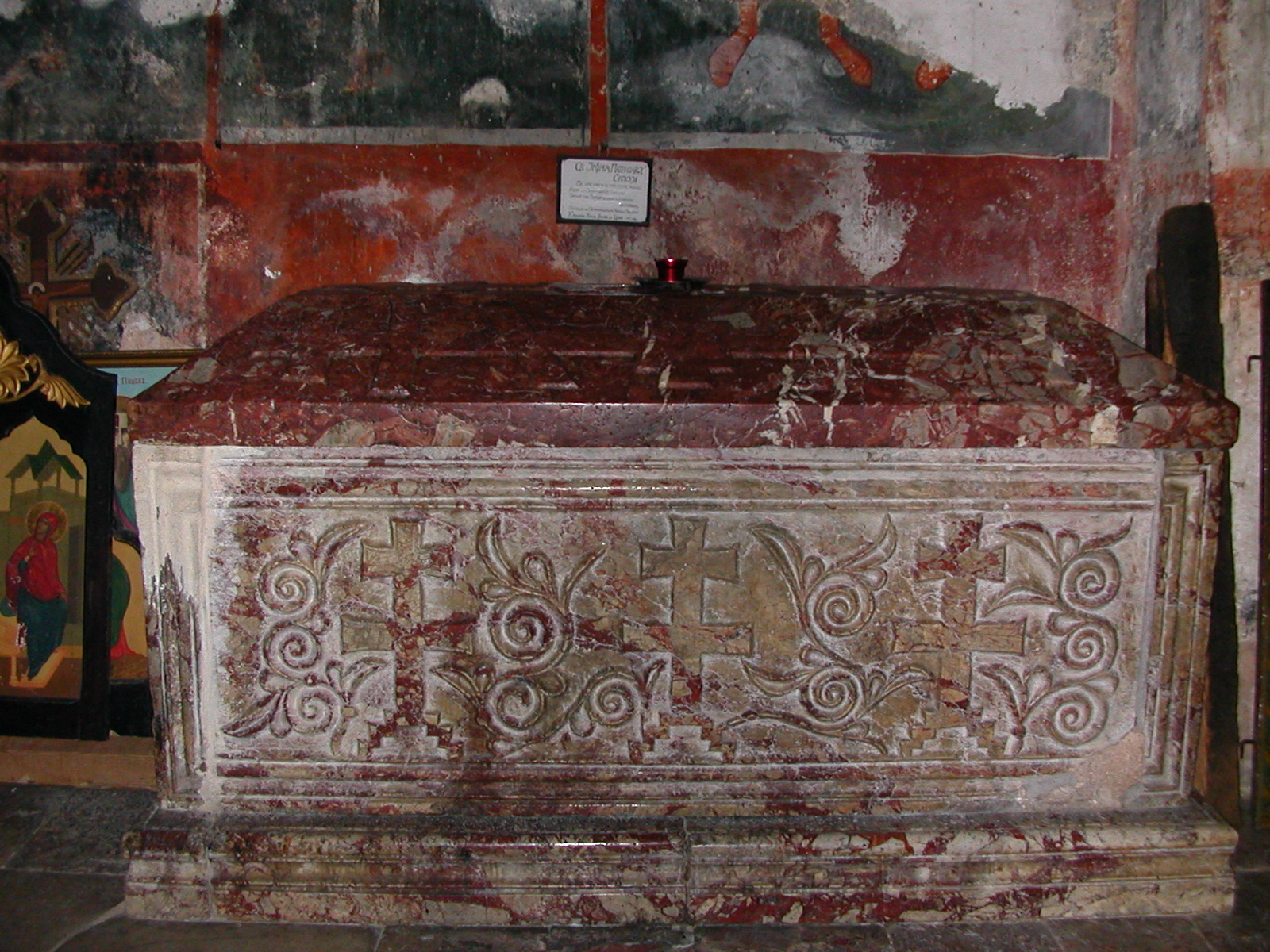 Unutrašnjost Crkve sv. Nikola i Bogorodične crkve - Pećka patrijaršija, autor Nikostrat Saronski